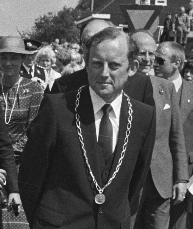 Bezoek Koningin Beatrix en prins Claus aan Noord-West-Overijssel, Zij worden in Zwartsluis, vergezeld door burgemeester Smit, door een erehaag van schoolkinderen begroet